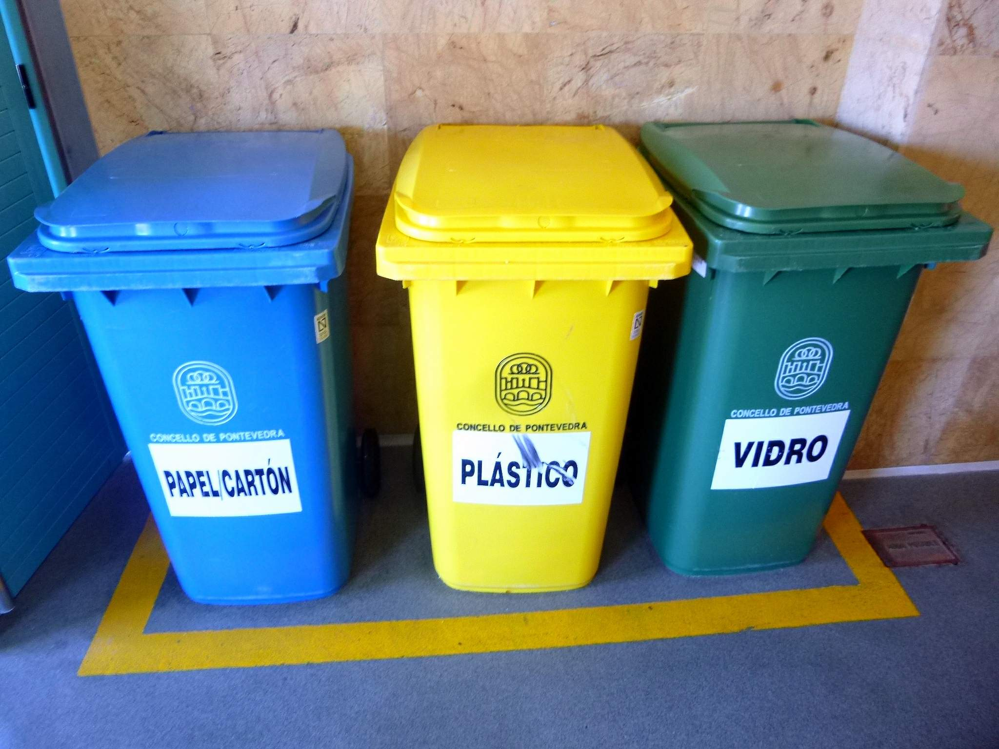 Mercado Municipal de Pontevedra